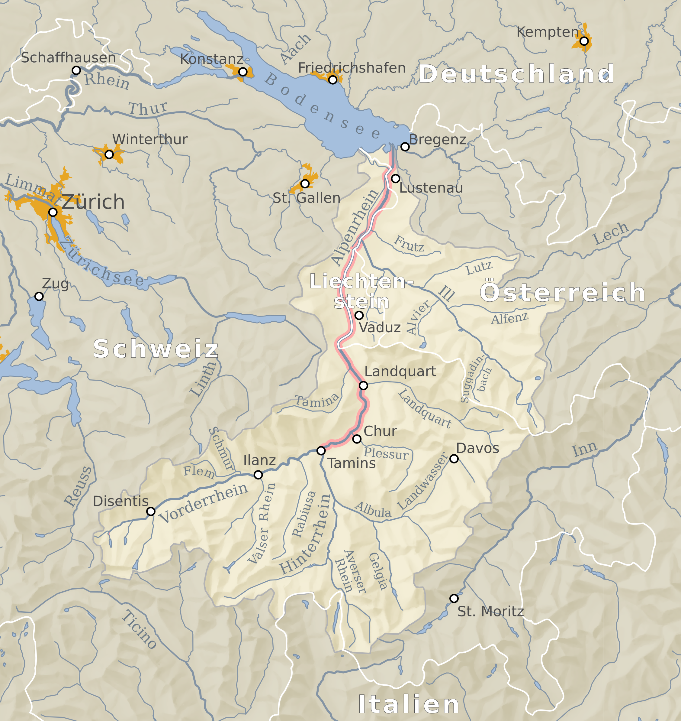 Karte des Einzugsgebietes des Alpenrheins.